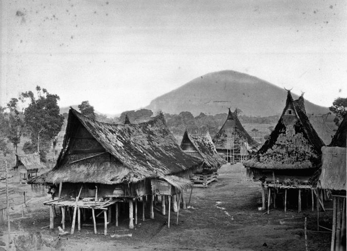 Panoramafoto. Gezicht over een Karo Batak dorp in de omgeving van het Tobameer